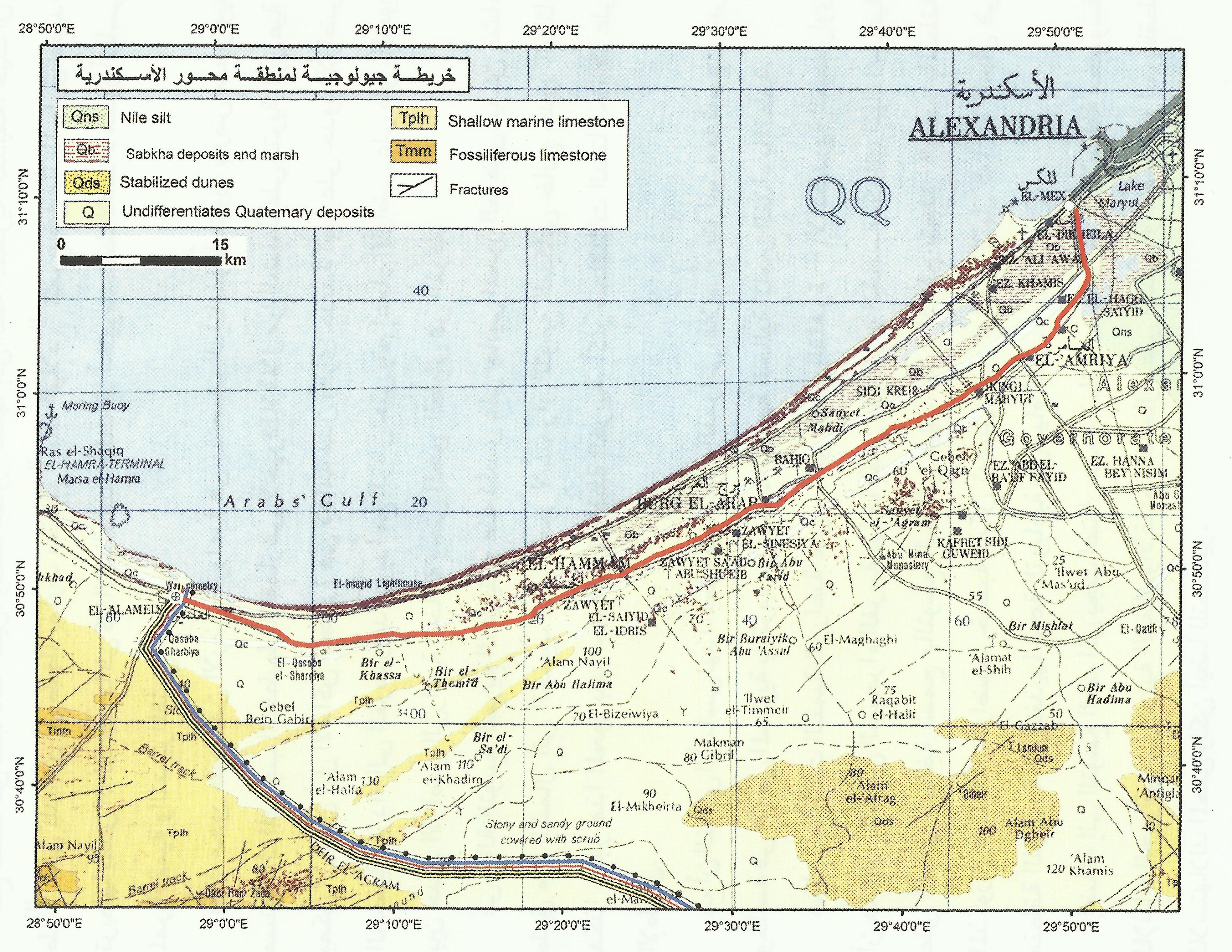 محور الاسكندرية - العلمين